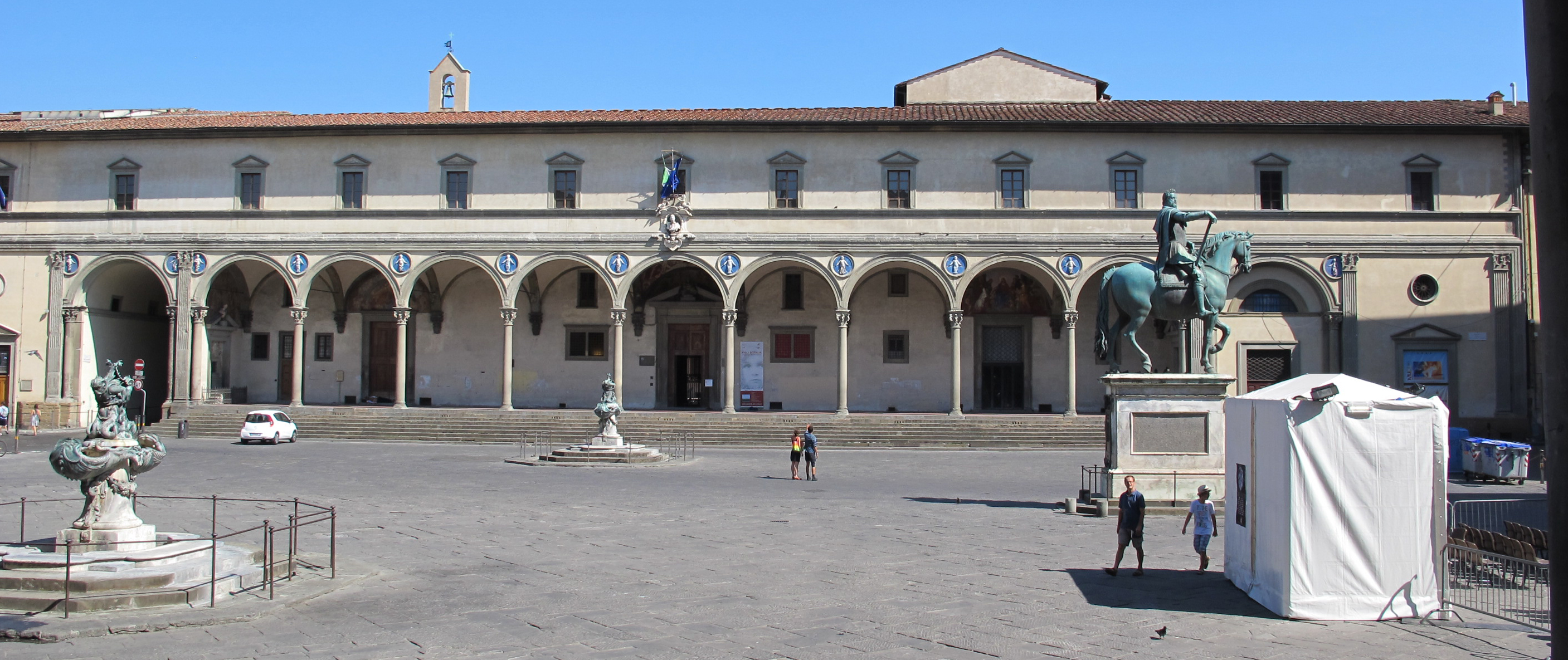 Spedale innocenti, veduta